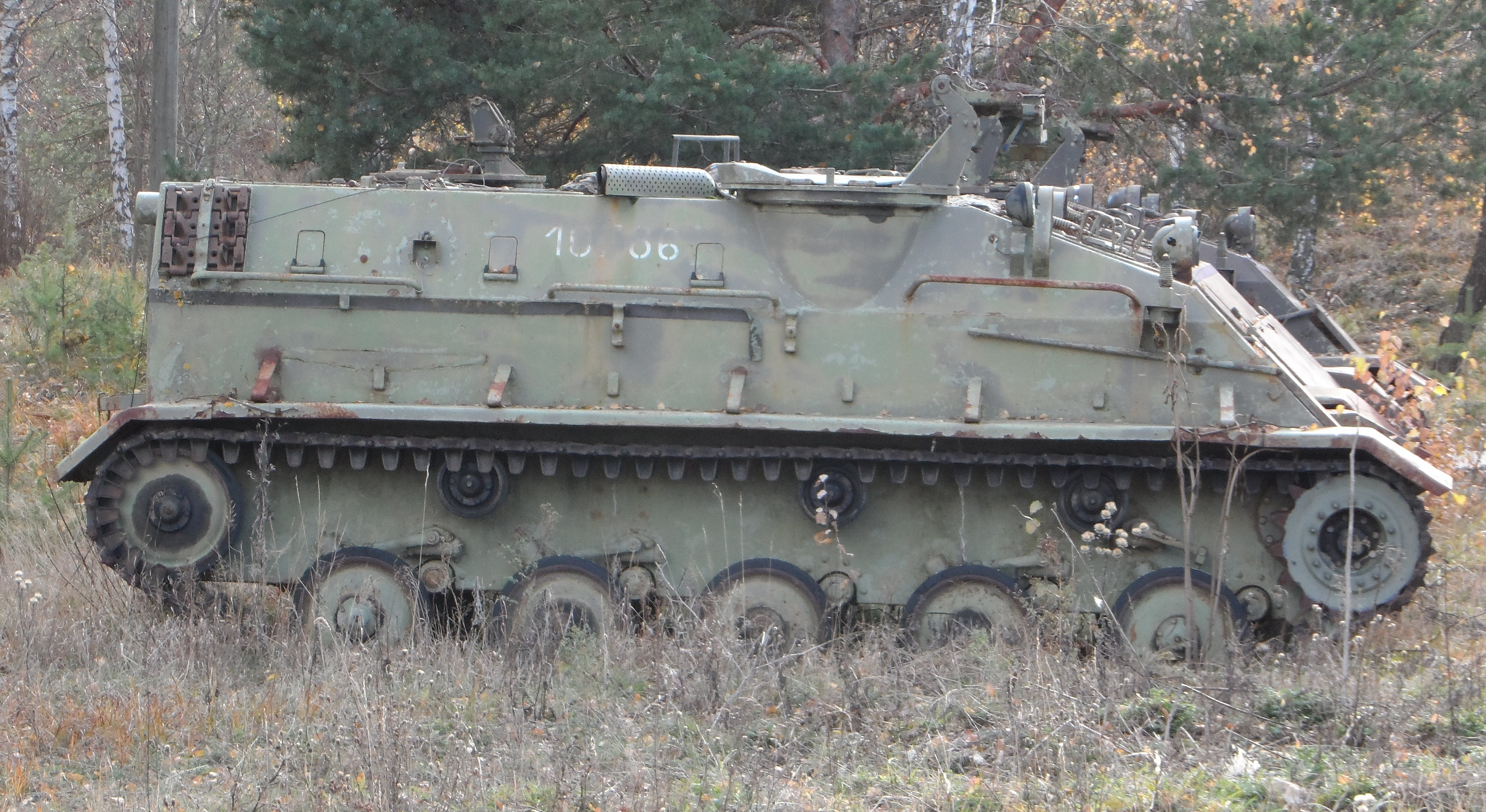 OT M-60 armoured personnel carrier of former Yugoslavia